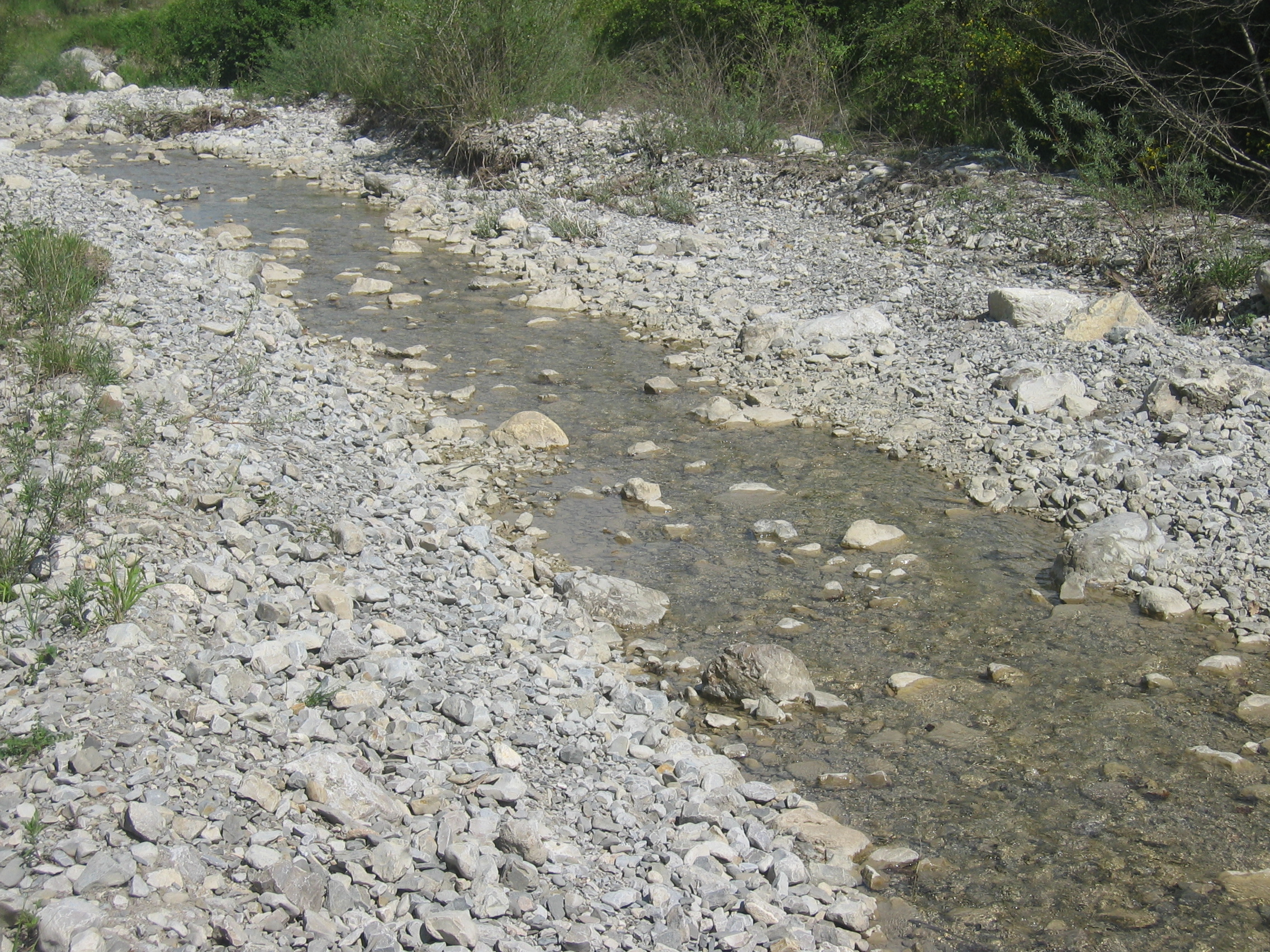 Cours d'eau de l'Esconavette sur la commune de Montmaur en Diois